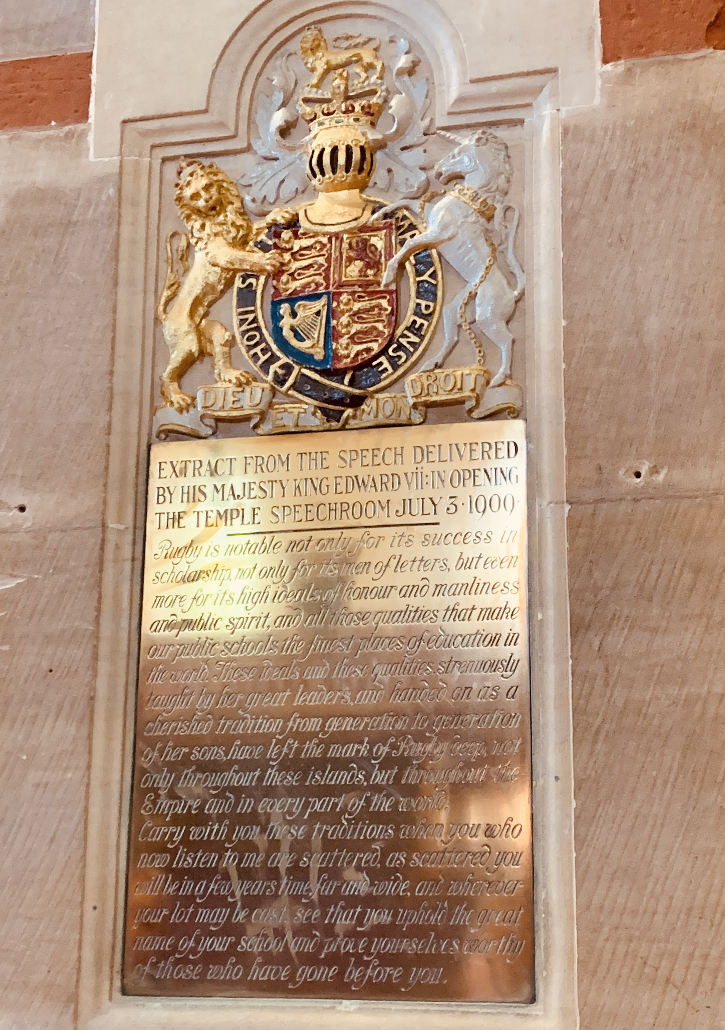 1909年に英国王室エドワード7せいがラグビー校を訪問した時に語った言葉